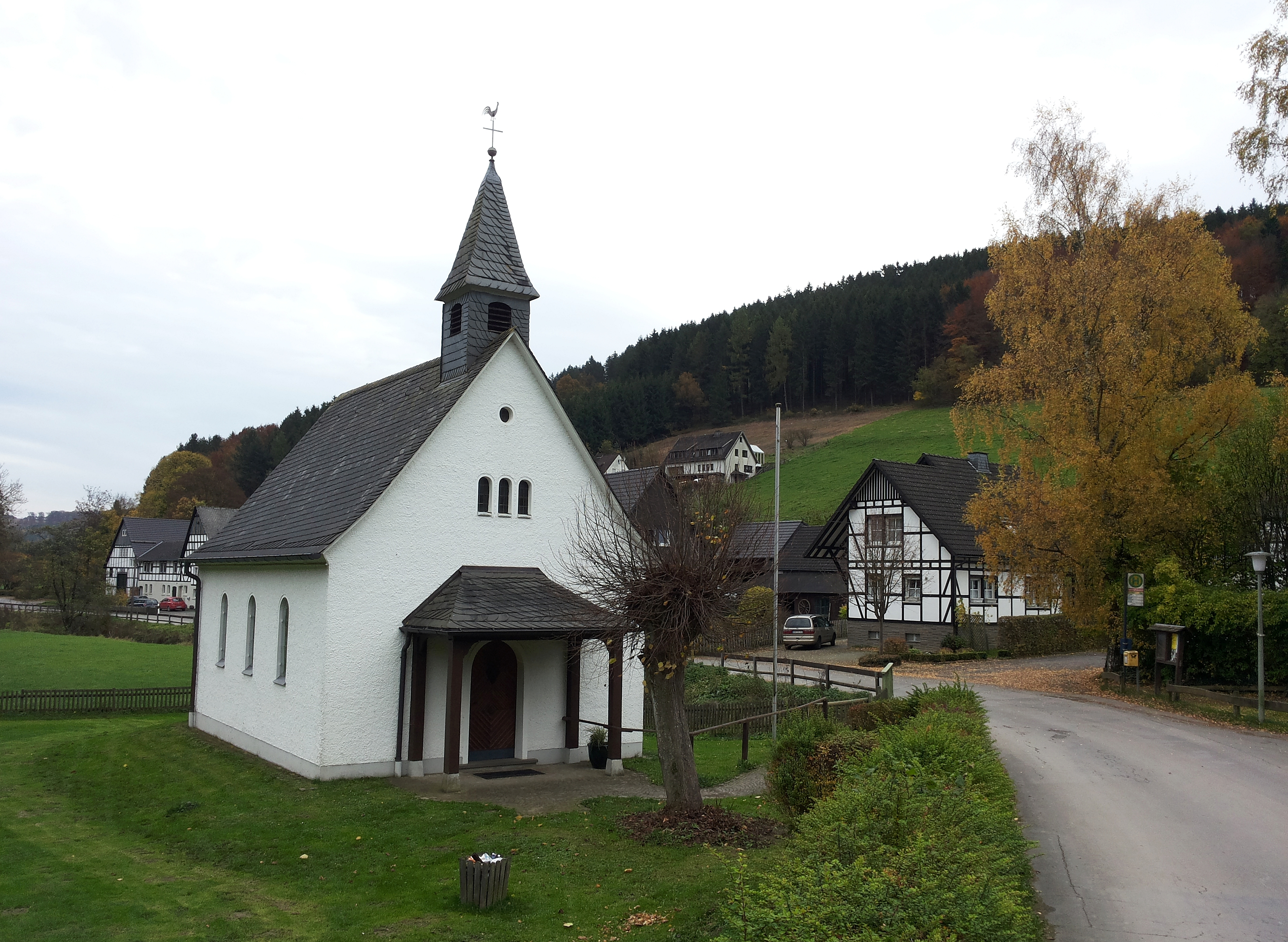 Kapelle St. Antonius Einsiedel in Eslohe-Sallinghausen (Germany)